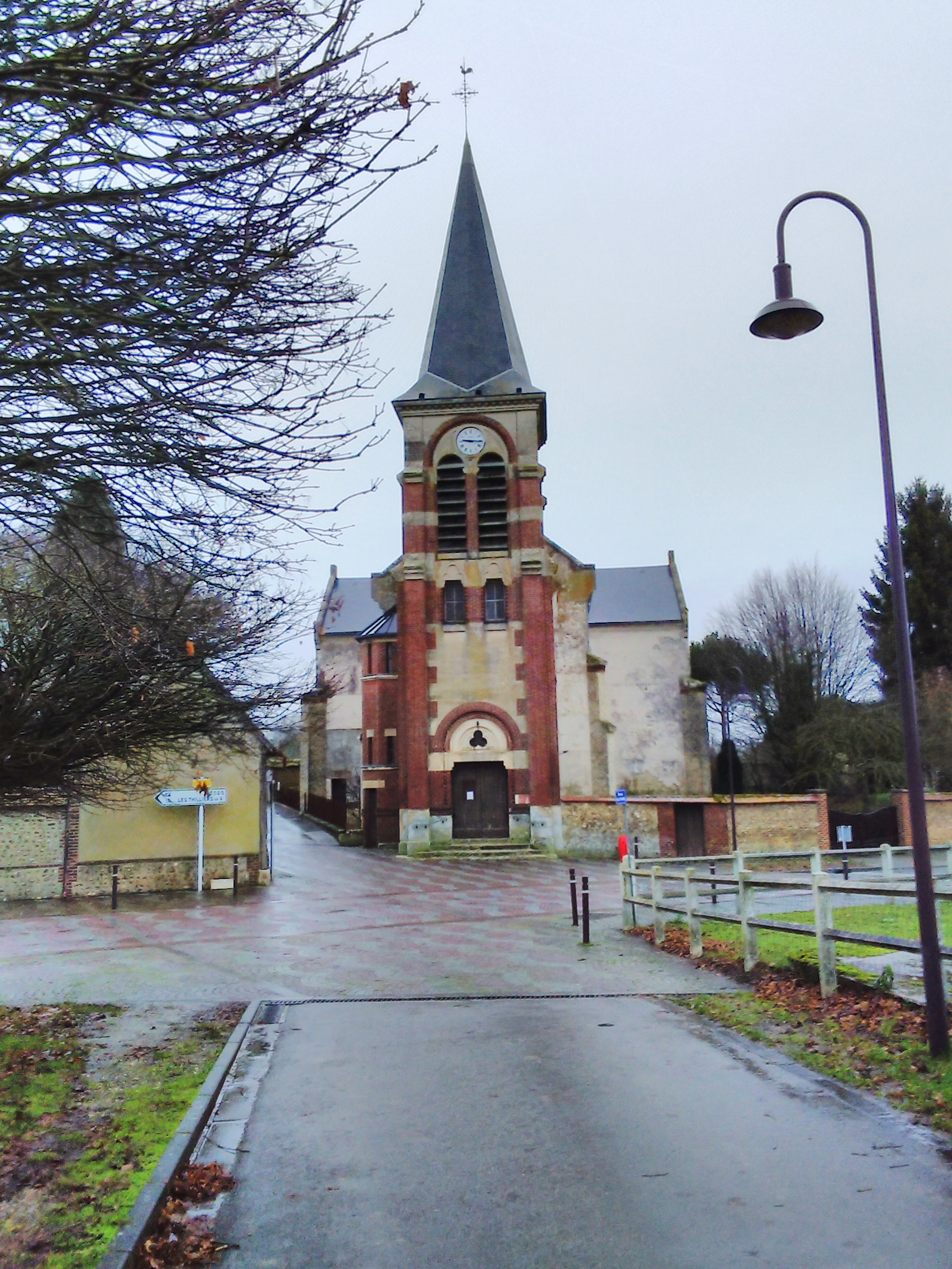 Tour de campagne du 16 décembre 2019.